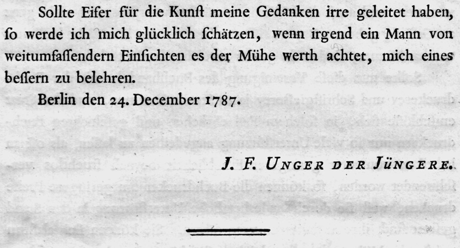 Beispiel aus: Johann Friedrich Unger: Etwas über den Buchhandel, Buchdruckerey und den Druck außerhalb Landes. 14 S. 24,5 x 21 cm. (Berlin) 1788. Sonderdruck aus der Monats-Schrift der Akademie der Künste und mechanischen Wissenschaften, Bd. 1, Berlin 1787, S. 37-48. Frühes Druckbeispiel der von Unger erst offiziell 1789 von Firmin Didot erworbenen Lizenz zur Einführung seiner neuen Antiqua-Lettern in verschiedenen deutschen Staaten.